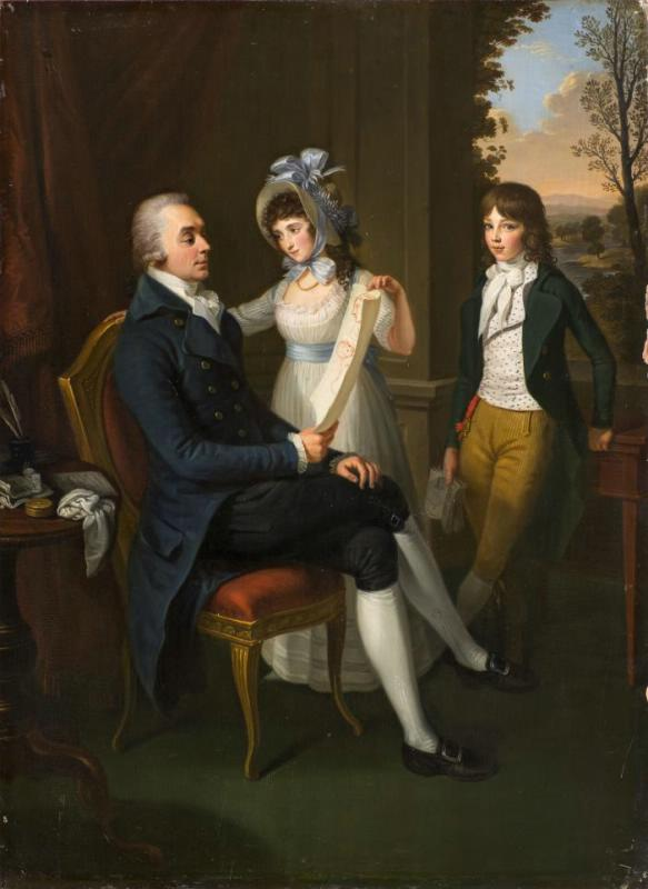 Portrait of Semyon Vorontsovlabel QS:Len,"Portrait of Semyon Vorontsov" label QS:Lru,"Людвиг Гуттенбрунн. Портрет графа Семена Романовича Воронцова с детьми. 1791. Дерево, масло. ГМЗ «Павловск»"